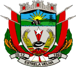 Brasão de Estrela Velha, Rio Grande do Sul